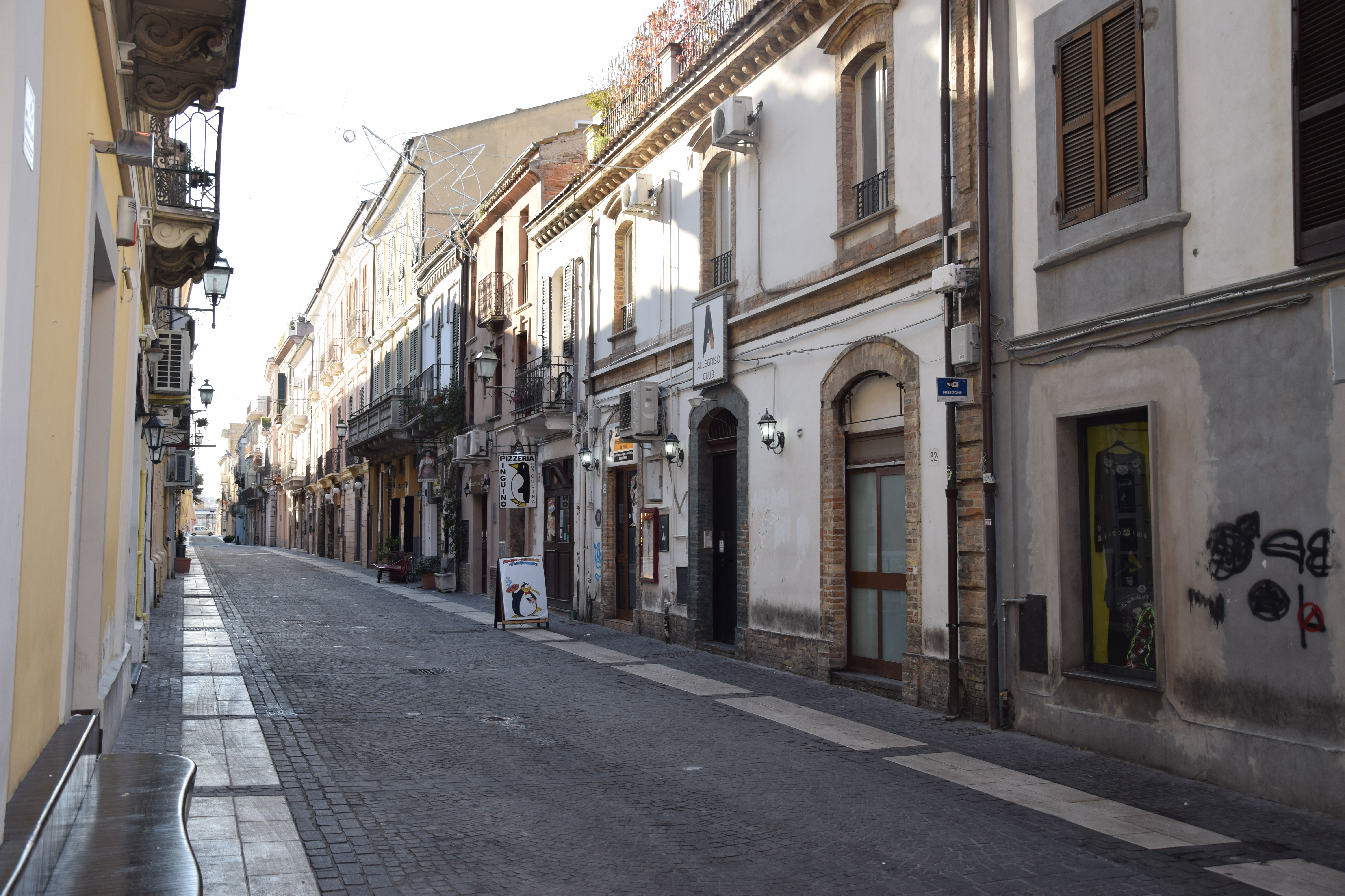 Corso Manthone Pescara